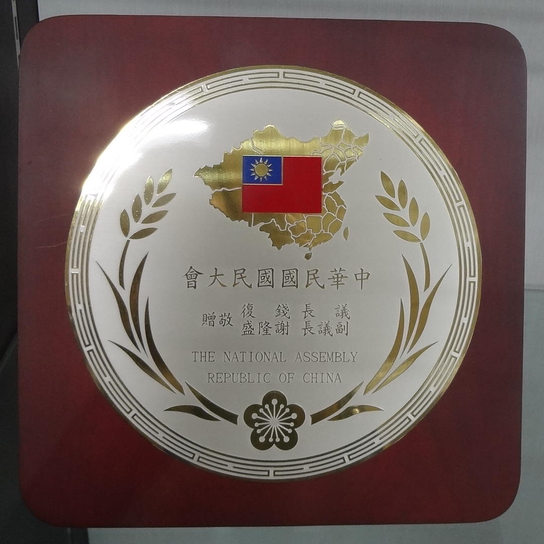 中華民國國民大會送給國立國父紀念館的紀念牌。